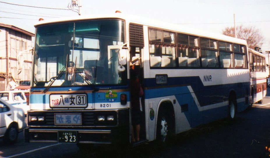 1994年11月27日撮影、西鉄八女営業所所属の8201号車